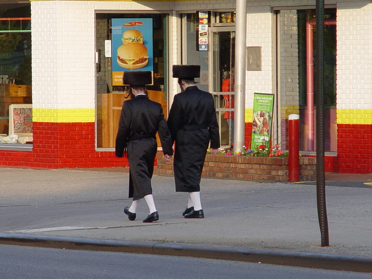 Haszid zsidók New Yorkban